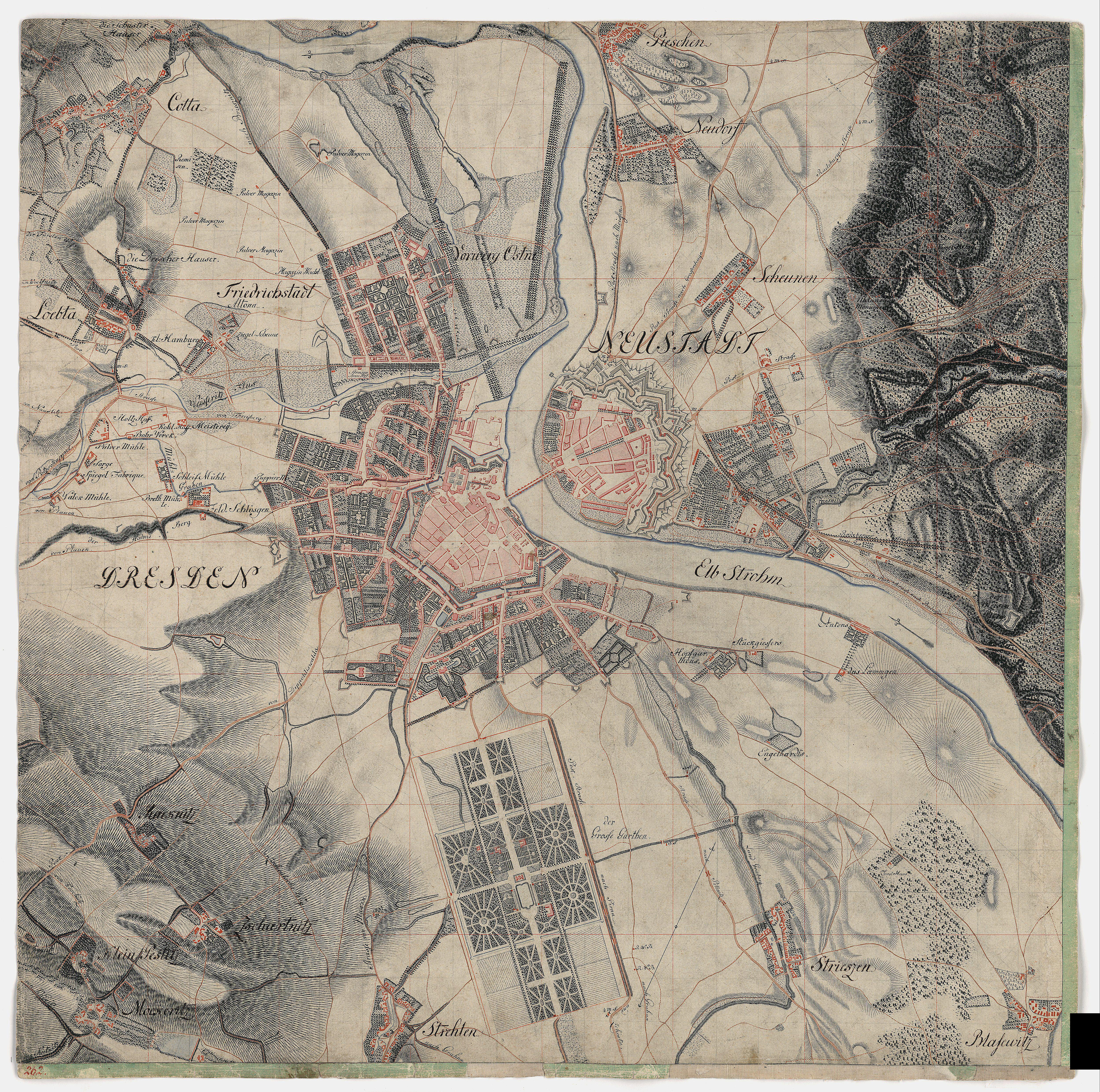 [Meilenblätter von Sachsen, Blatt 181 - 367] : Berliner Exemplar / [aufgenommen vom Sächs. Ing.-Korps 1780 - 1806 unter Ltg. von Friedrich Ludwig Aster]. - [1:12 000]. - 1 Kt. in 370 Teilen : mehrfarb. ; je Bl. 57 x 57 cm Auch als Königsexemplar bezeichn. - Mit Höhenschraffen. - Nordwesten oben Dresden, Strehlen, Friedrichstadt, Löbtau, Pieschen, Striesen, Mockritz. Blatt 262 aus: Meilenblätter von Sachsen Datierung: 1785 Blatt 262